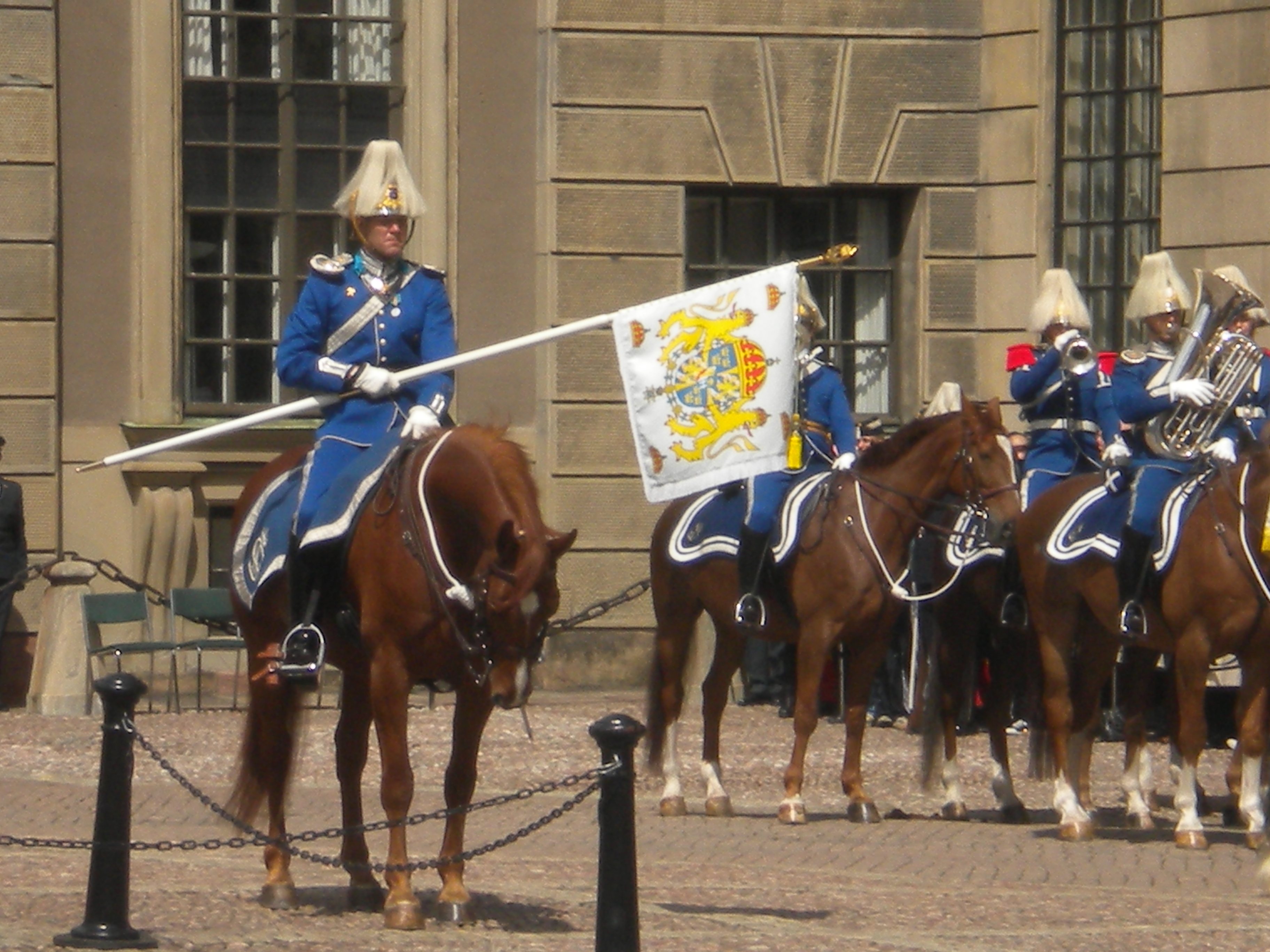 Livgardets Dragoners standar vid högvaktsavlösningen på nationaldagen 2012.